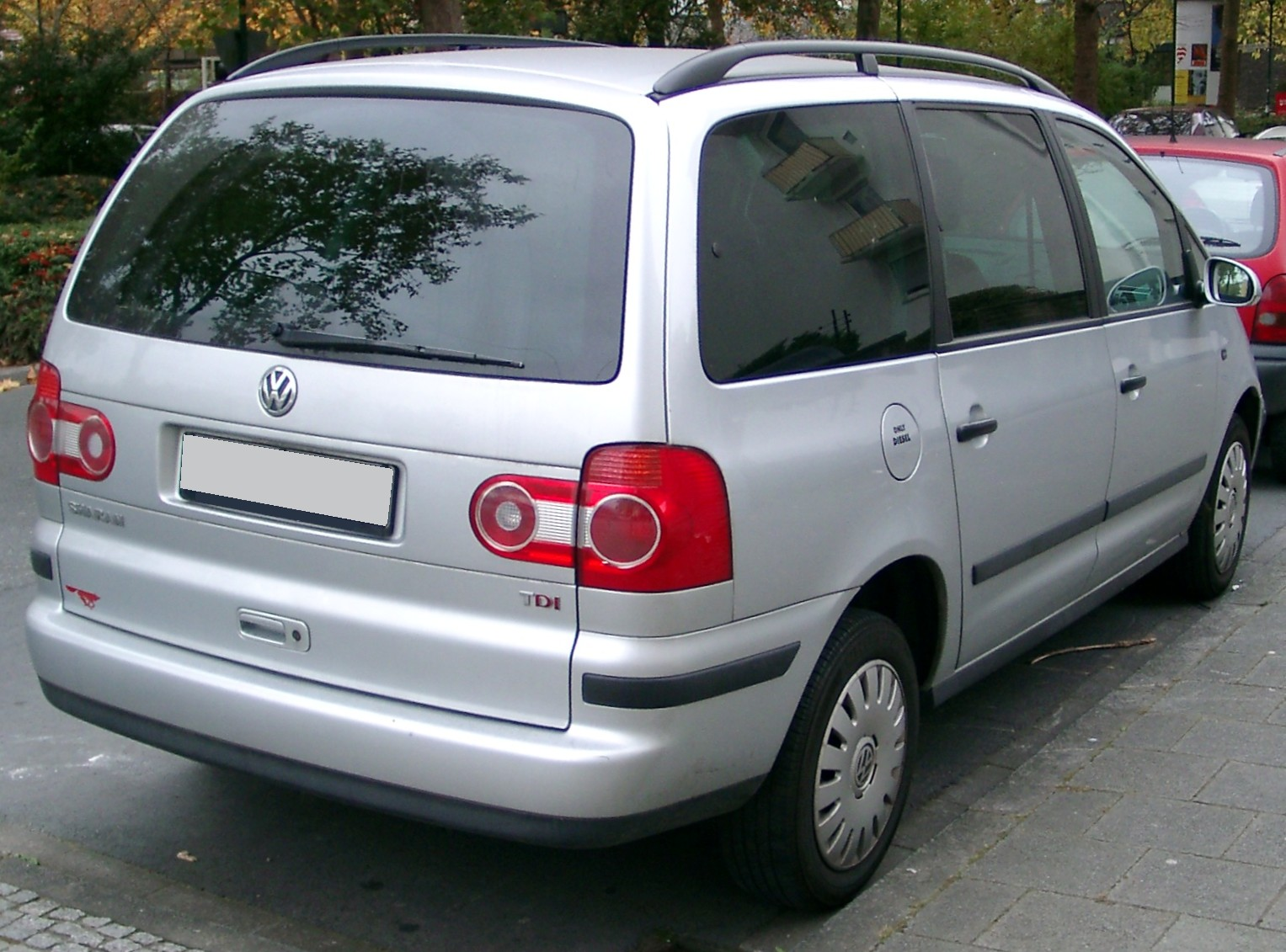 VW Sharan Facelift